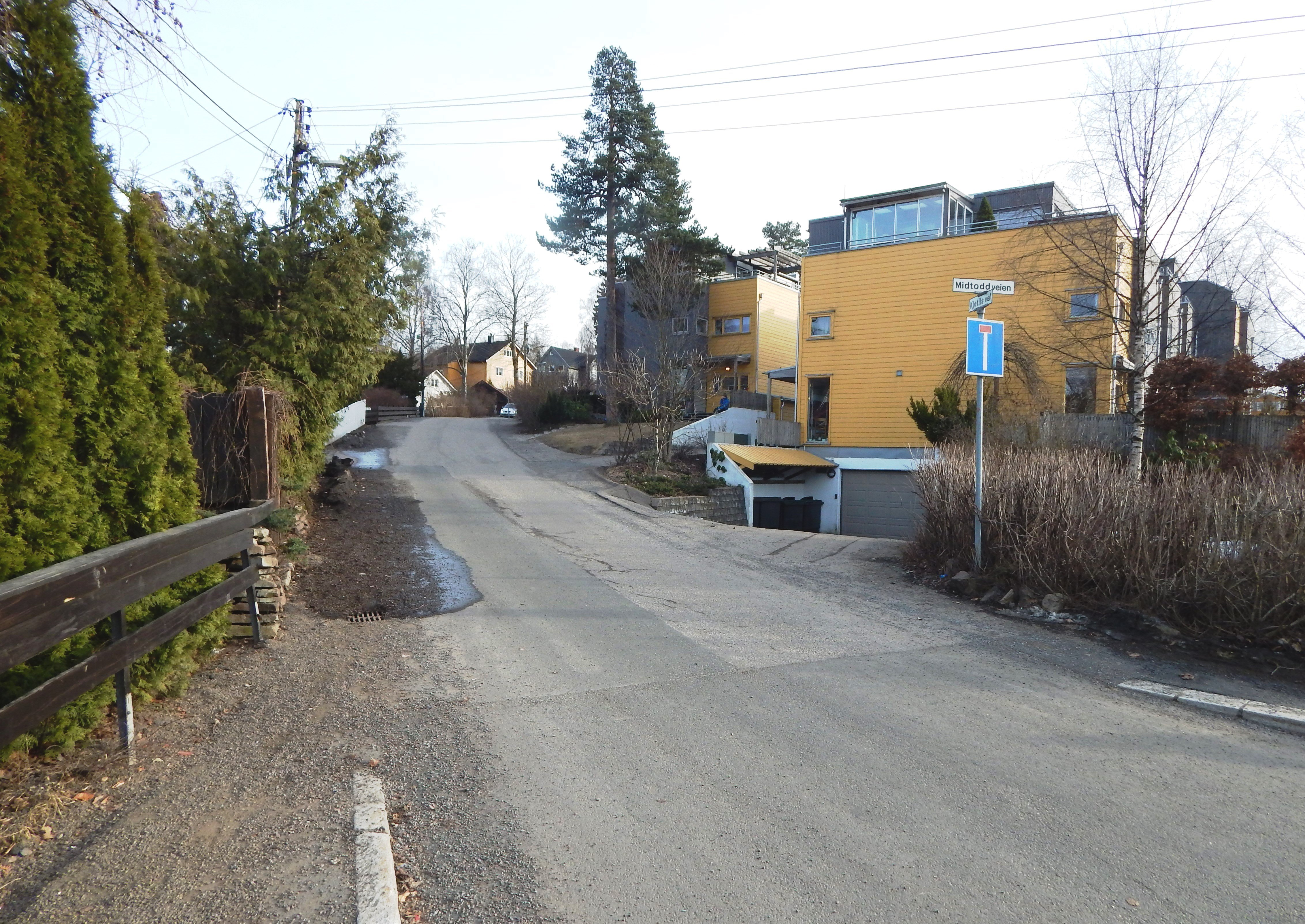 Kjetils vei på Kjelsås